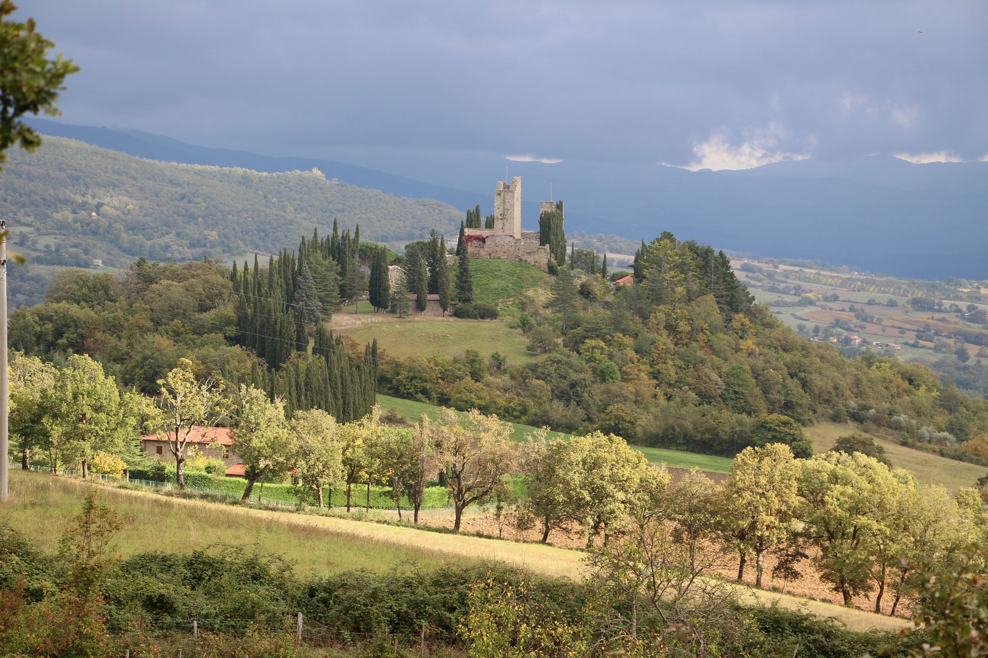 Castello di Romena